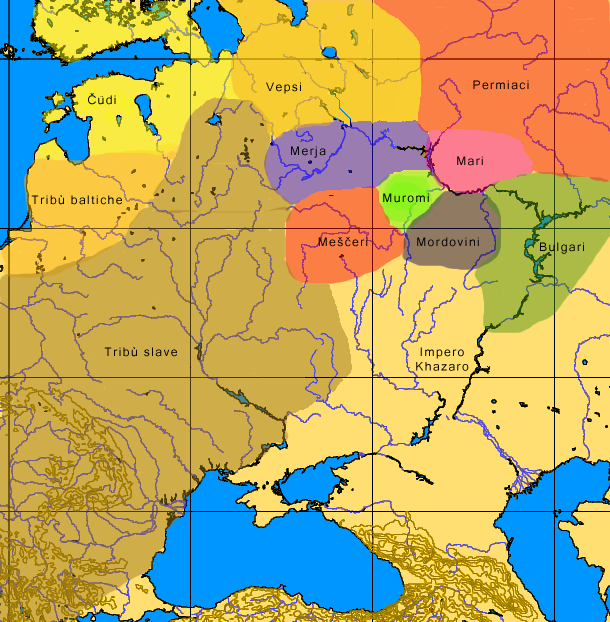 Map of Russian area in 9th century BC, for Italian readers. Mappa della zona della Russia Europea intorno al IX secolo